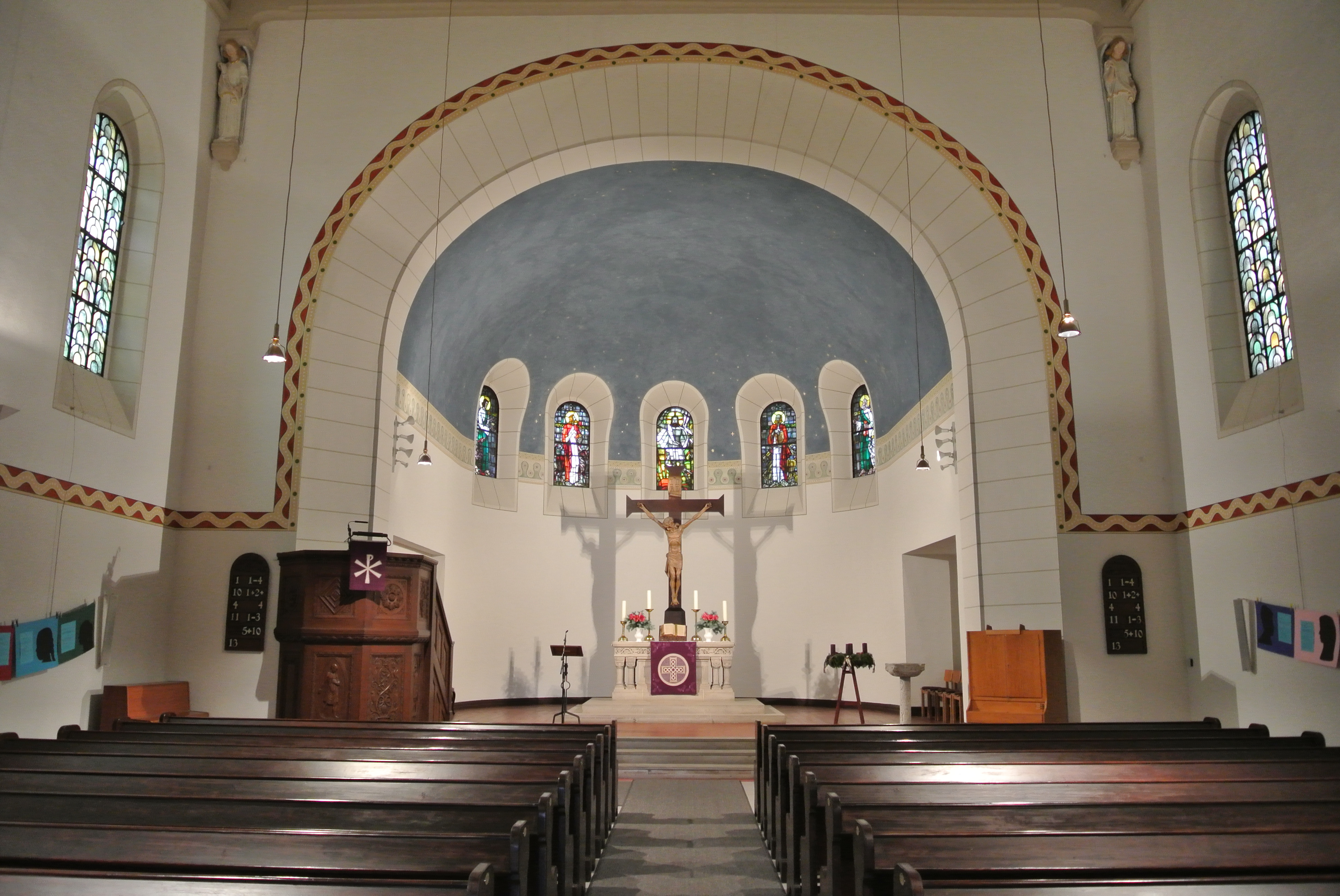 Evangelische Martinuskirche in Frankfurt-Schwanheim von 1911, Architekt Otto Bäppler, Baudenkmal, Altarraum